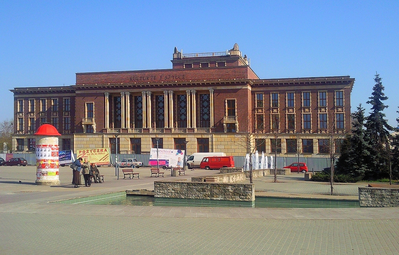 Dąbrowa Górnicza, plac Wolności 1 - budynek Pałacu Kultury Zagłębia (zabytek A 1240/79 z 22.11.1979)